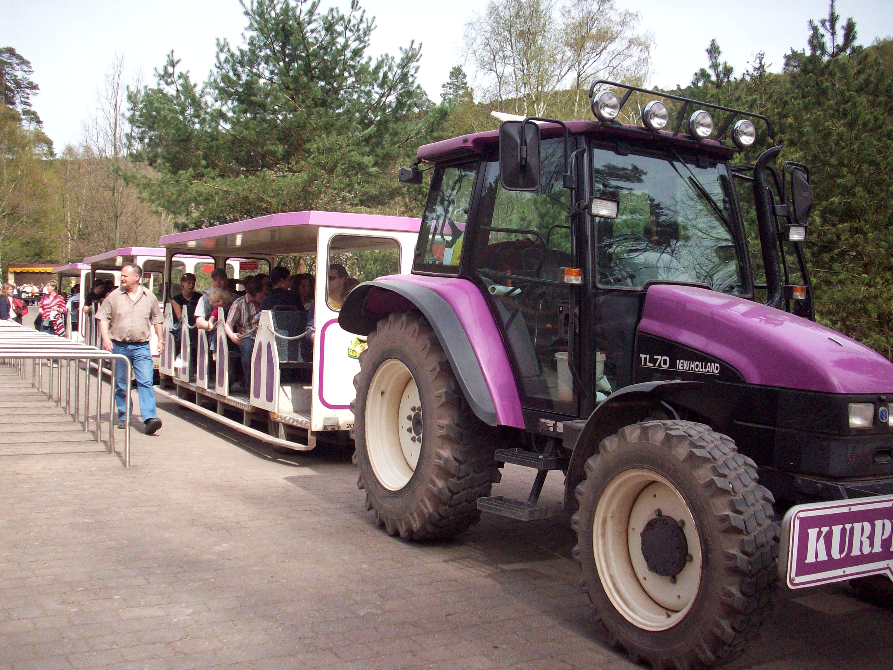 „Kurpfalz-Express“ des Kurpfalz-Parks Wachenheim, Deutschland. New-Holland-Traktor TL70.